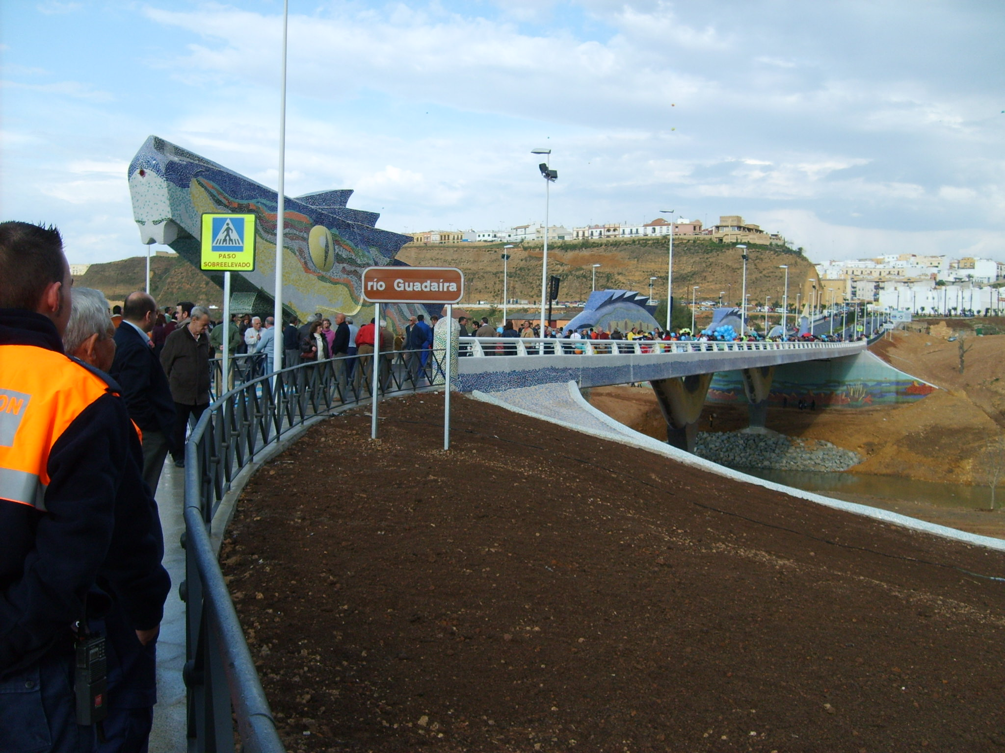 Puente del Dragón de Alcalá de Guadaíra el día de su inauguración.